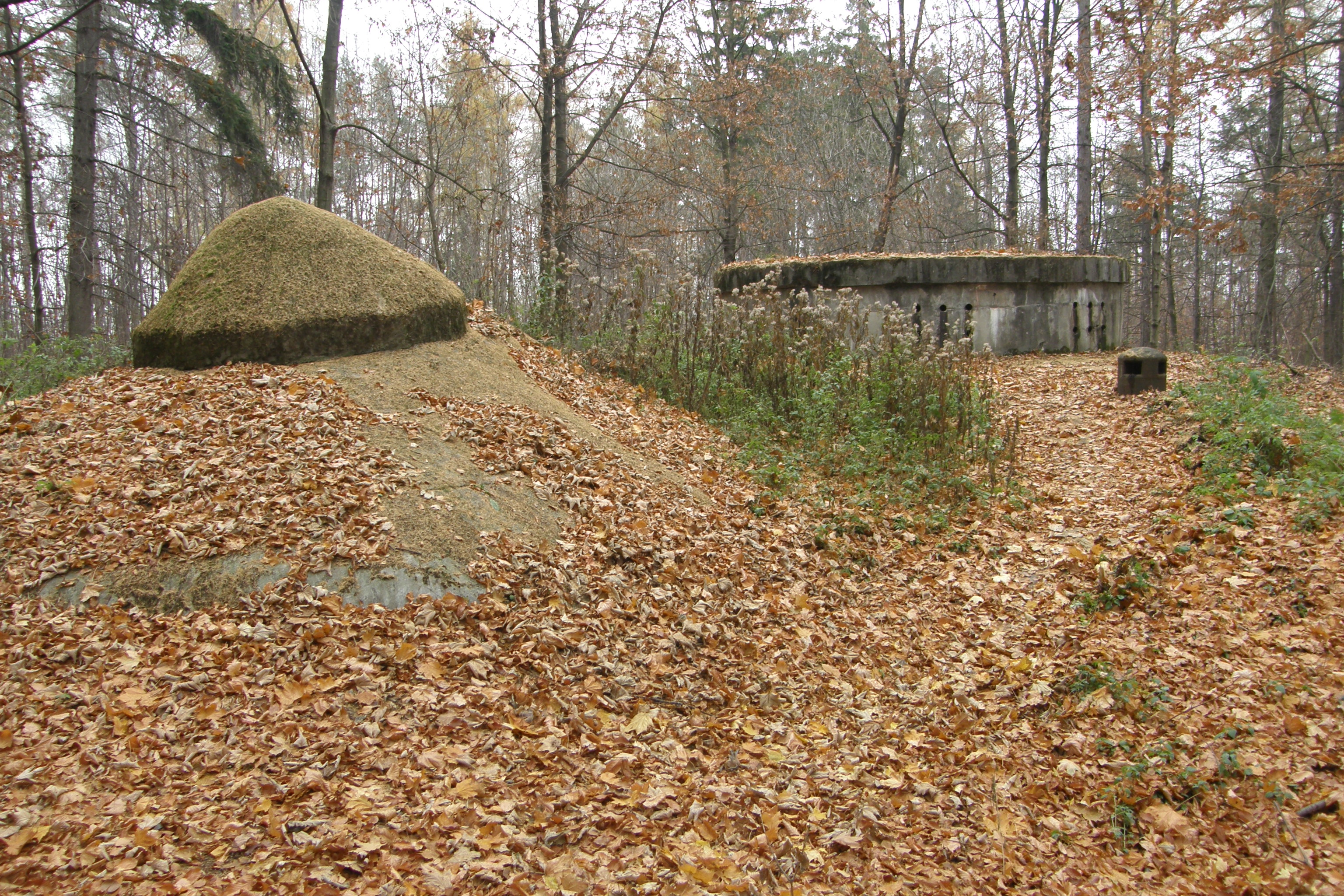 Dělostřelecká otočná a výsuvná věž MO-Sm-S 38 V lese tvrze Smolkov